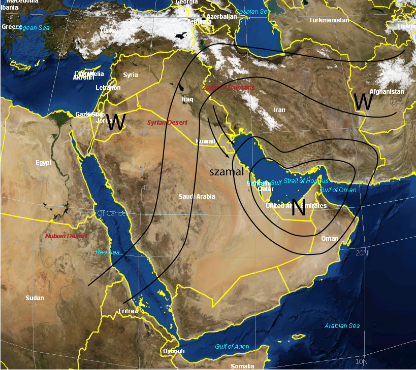 Struktura wiatrów szamalowych w lecie.